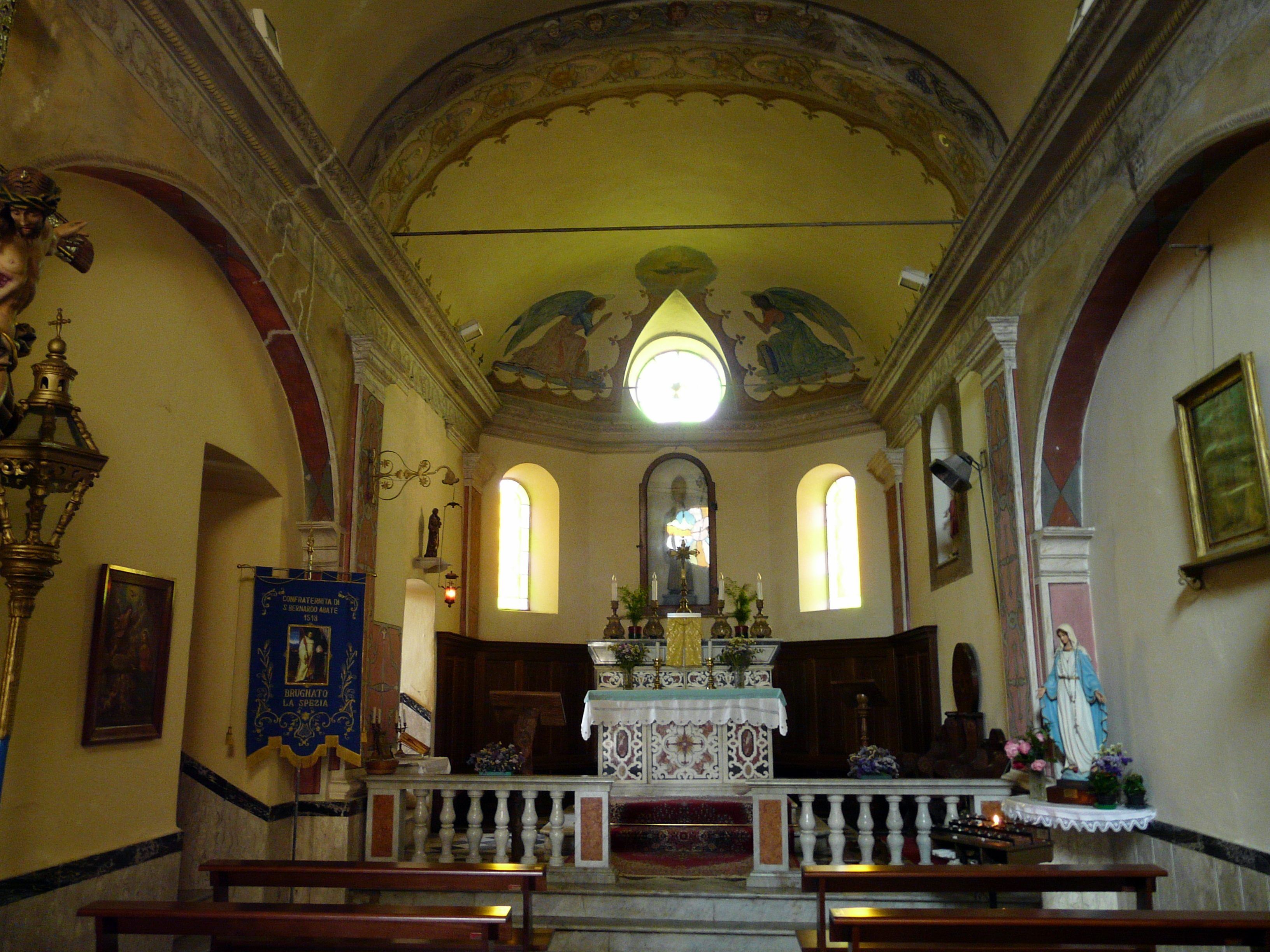 Interno dell'oratorio di San Bernardo, Brugnato, Liguria, Italia